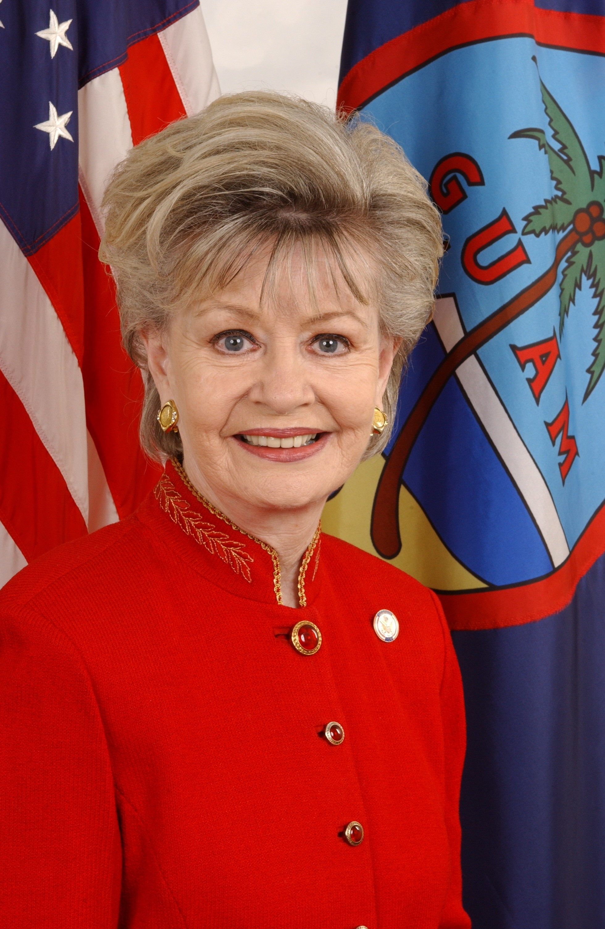 Madeleine Bordallo, U.S. Delegate (D-Guam, 2003-present)